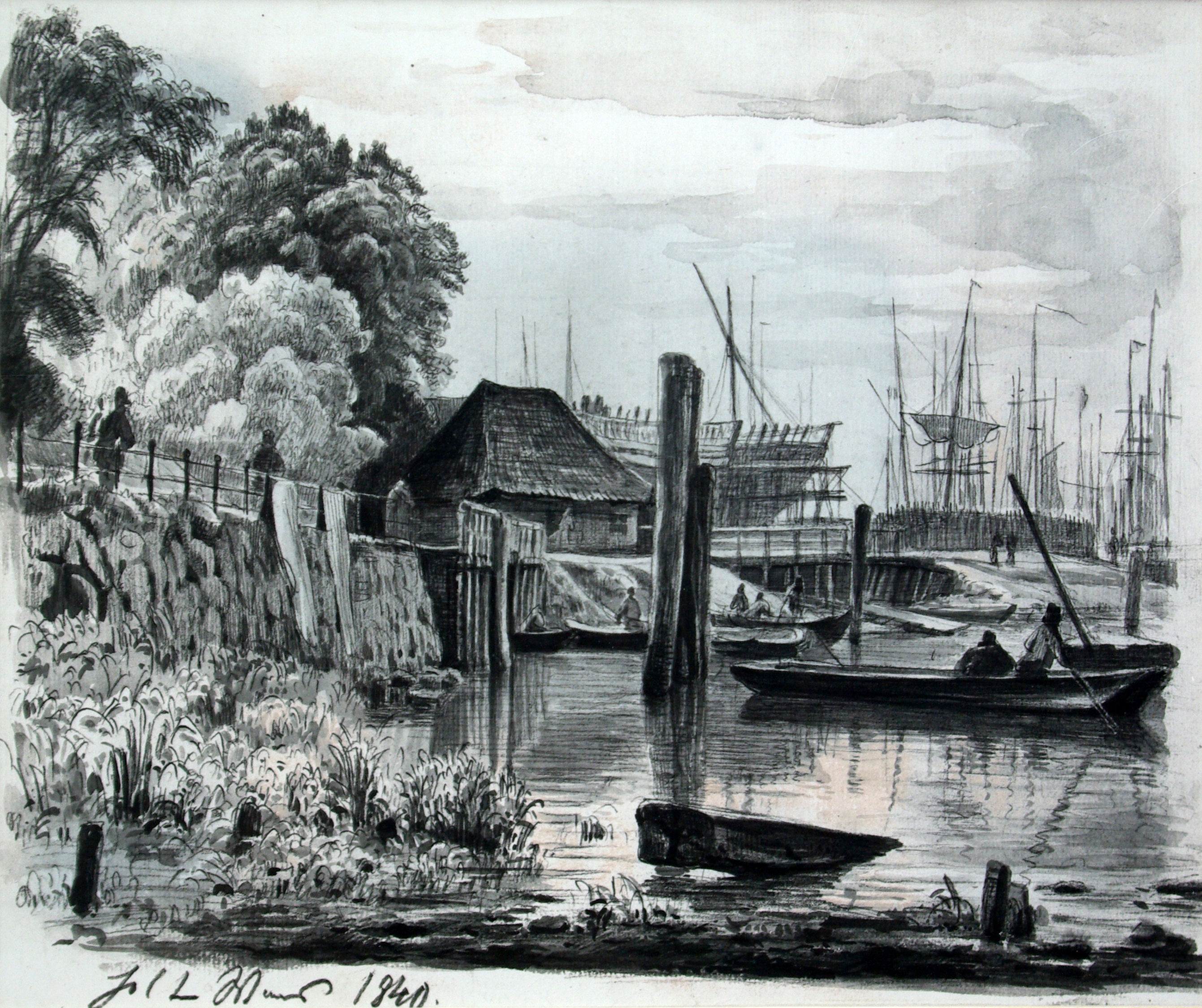 Hamburger Hafenpartie mit der Reiherstieg Schiffswerft („Das sogenannte ehemalige hölzerne Wambs.“).